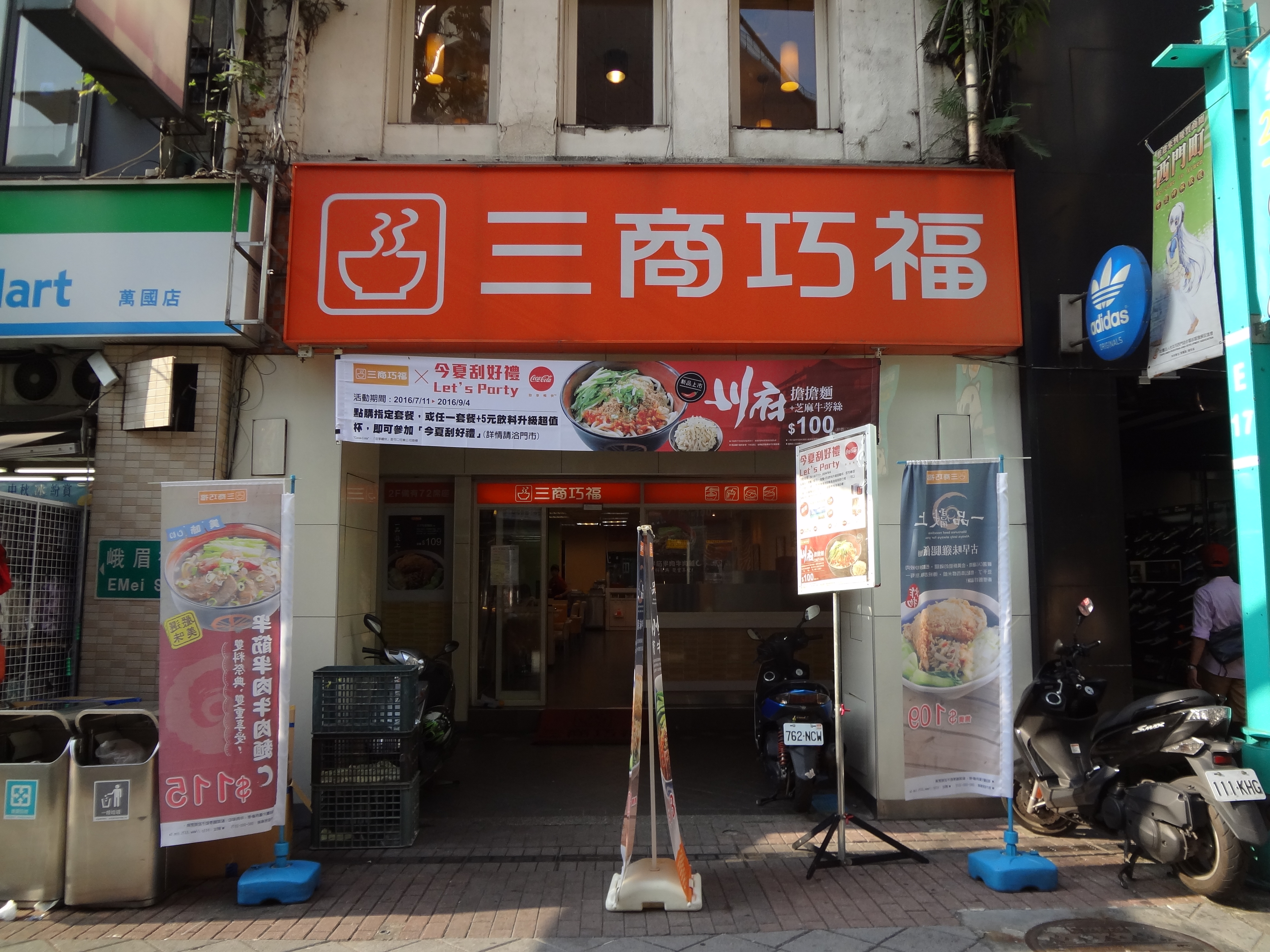 中文（台灣）: 三商巧福峨眉店，位於臺北市萬華區峨眉街19號。